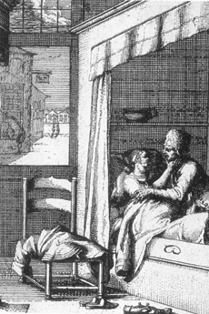 Kweesten. Historie der Questers van H. Padtbrugge . 1683.